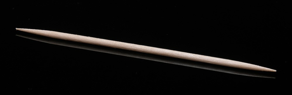 Zahnstocher aus Holz auf reflektierender schwarzer Glasscheibe